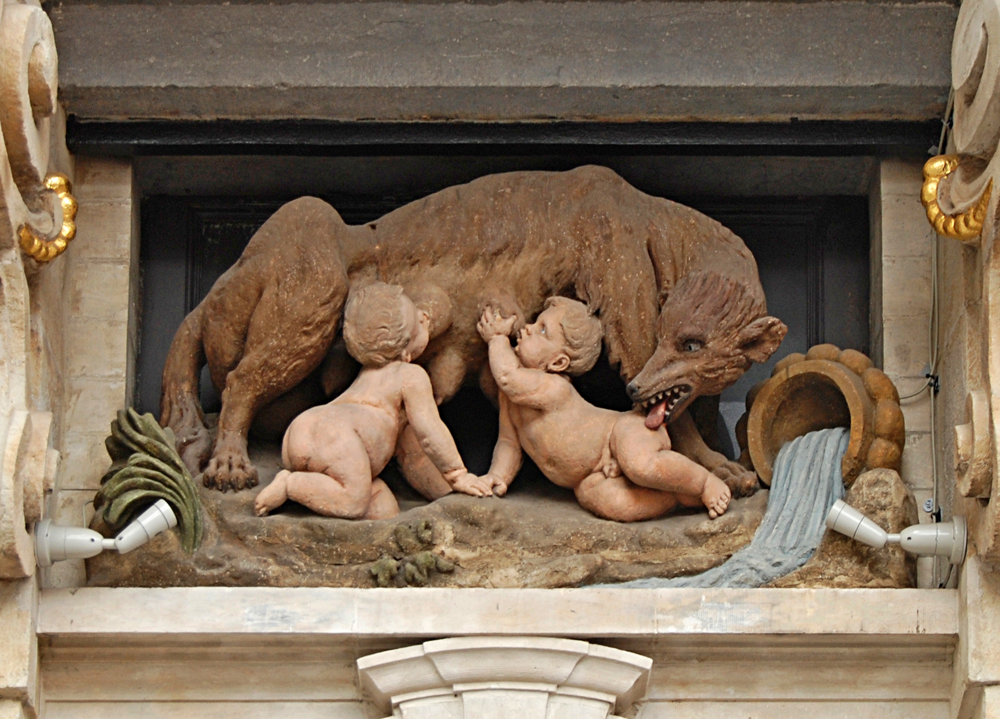 Belgique - Bruxelles - Grand-Place - Maison de la Louve - Romulus, Rémus et la louve après restauration